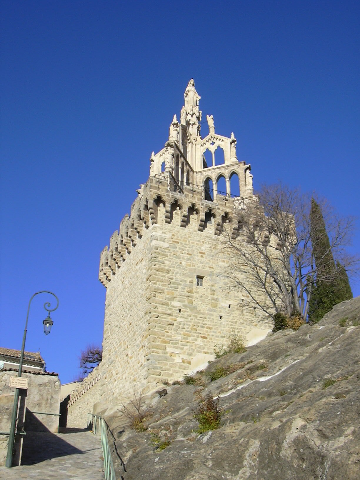 La Tour Randonne, appelée aussi la chapelle de Bon Secours située sur les hauteurs du quartier des Forts : le 21 octobre 1862, M.L Francou, curé de Nyons, se rendit acquéreur de l'antique tour Randonne et la fit convertir en chapelle. La première messe y fut célébrée le 14 août 1864. Sur le vieux donjon se dresse une pyramide de trois étages d'arcades à quatre faces ornées de statues. Elle soutient une statue colossale de la Vierge. Le monument, en y comprenant la tour Randonne elle-même, mesure 24 mètres de hauteur et domine toute la vallée. La tour Randonne fut jadis construite par Randonne de Montaubant en 1280, rattachant ainsi sa baronnie à Nyons. Un tablernacle du xviie siècle est classé au titre des monuments historiques. Fotograf/Zeichner: User:Samsamsam Datum: ... andere Versionen: ...